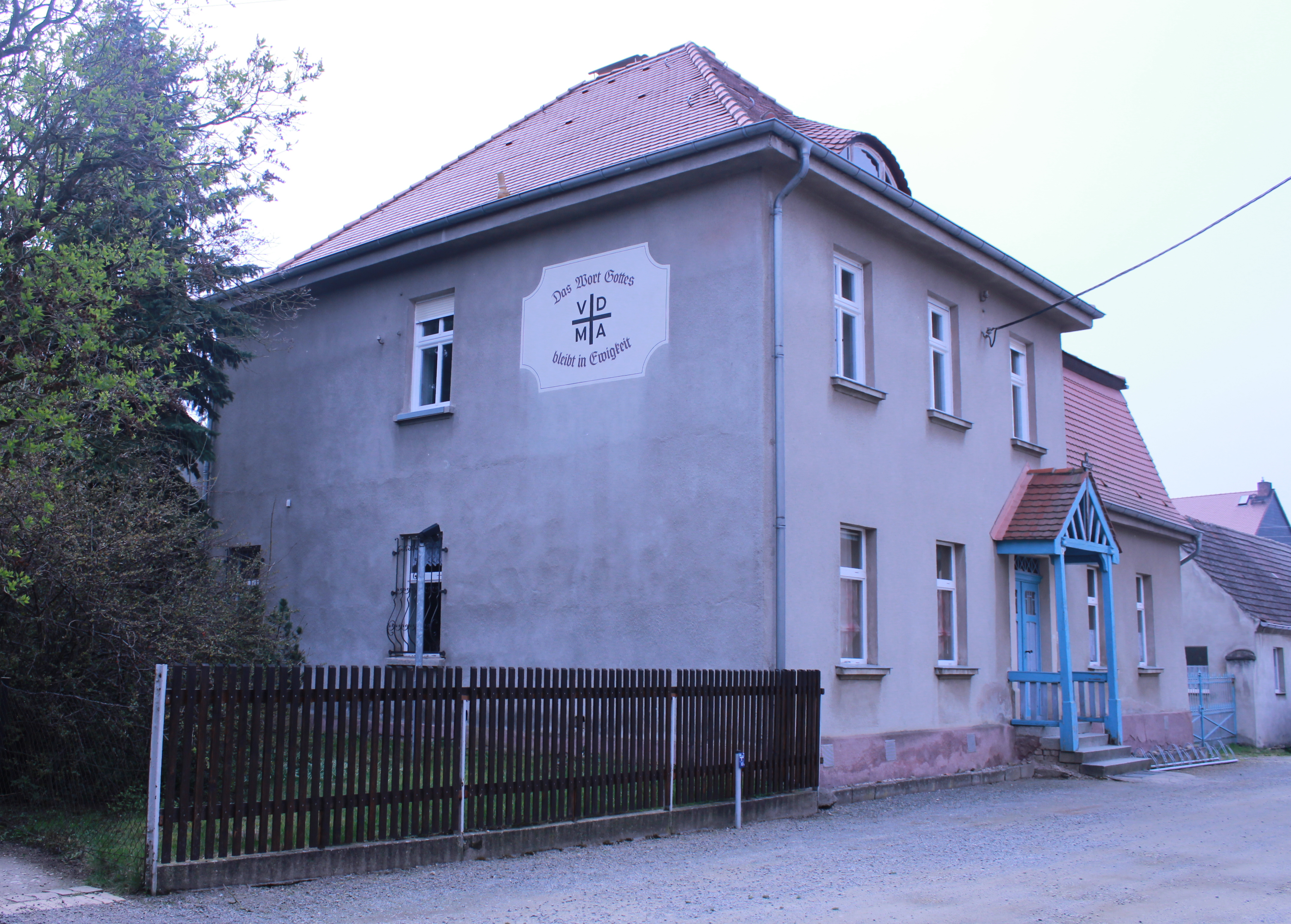 Großthiemig